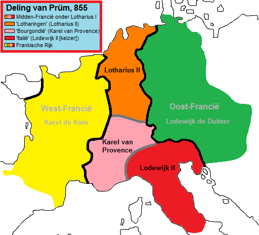 Deling van Midden-Francië krachtens het Verdrag van Prüm 855.